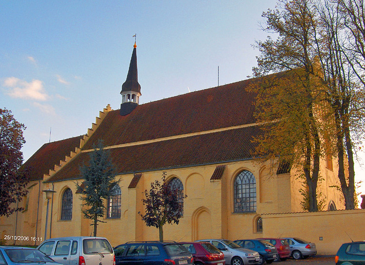 fra nordvest